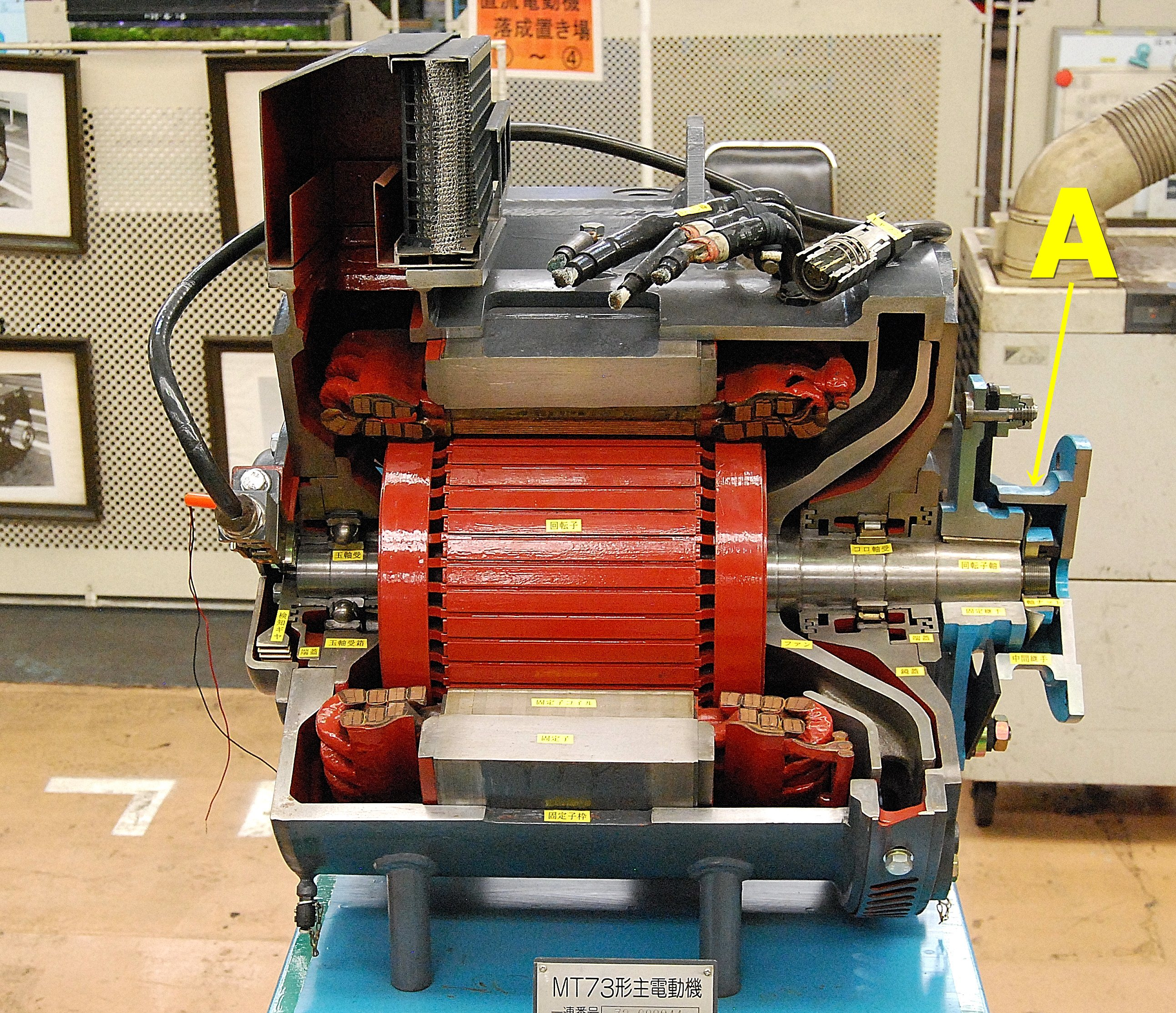 TD平行カルダン駆動方式を使用しているMT73形かご形三相誘導電動機。 Aが電動機の回転子の出力軸側に直接取り付けられたTD継手で、その後、輪軸の歯車駆動軸側に取り付けられたTD継手とボルト締結される。（夏休みフェアイベントでのJR東京総合車両センター公開時に撮影）